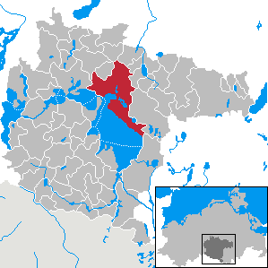 Waren (Müritz) im Landkreis Müritz, Mecklenburg-Vorpommern